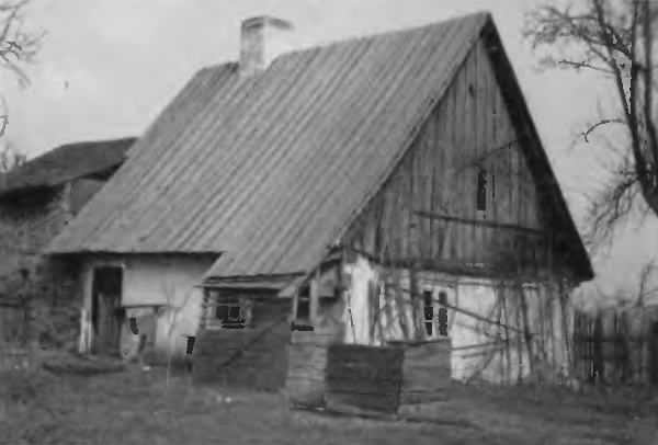 Kolonistenhaus in Neuwedel in Oberschlesien um 1930.